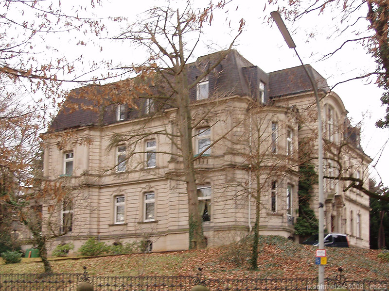 Denkmalgeschütztes Gebäude in der Bismarckstr. 48 in Heilbronn